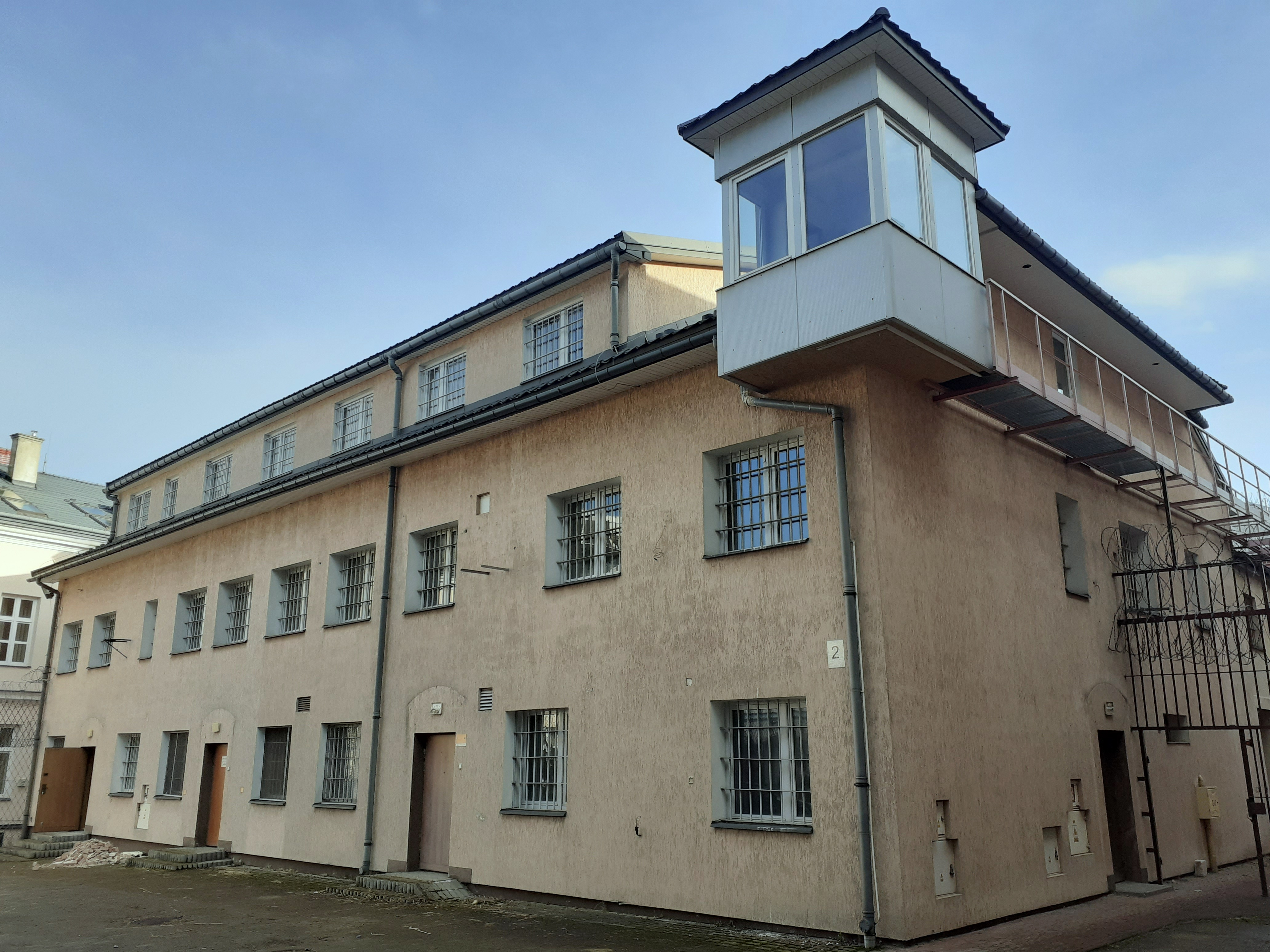 Dziedziniec byłego Aresztu Śledczego w Sanoku (grudzień 2019).